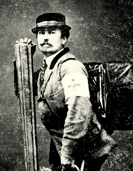 Porträt des Hofphotographen August Kampf; Lizenzfrei, da hier gemäß Website nicht kommerziell genutzt